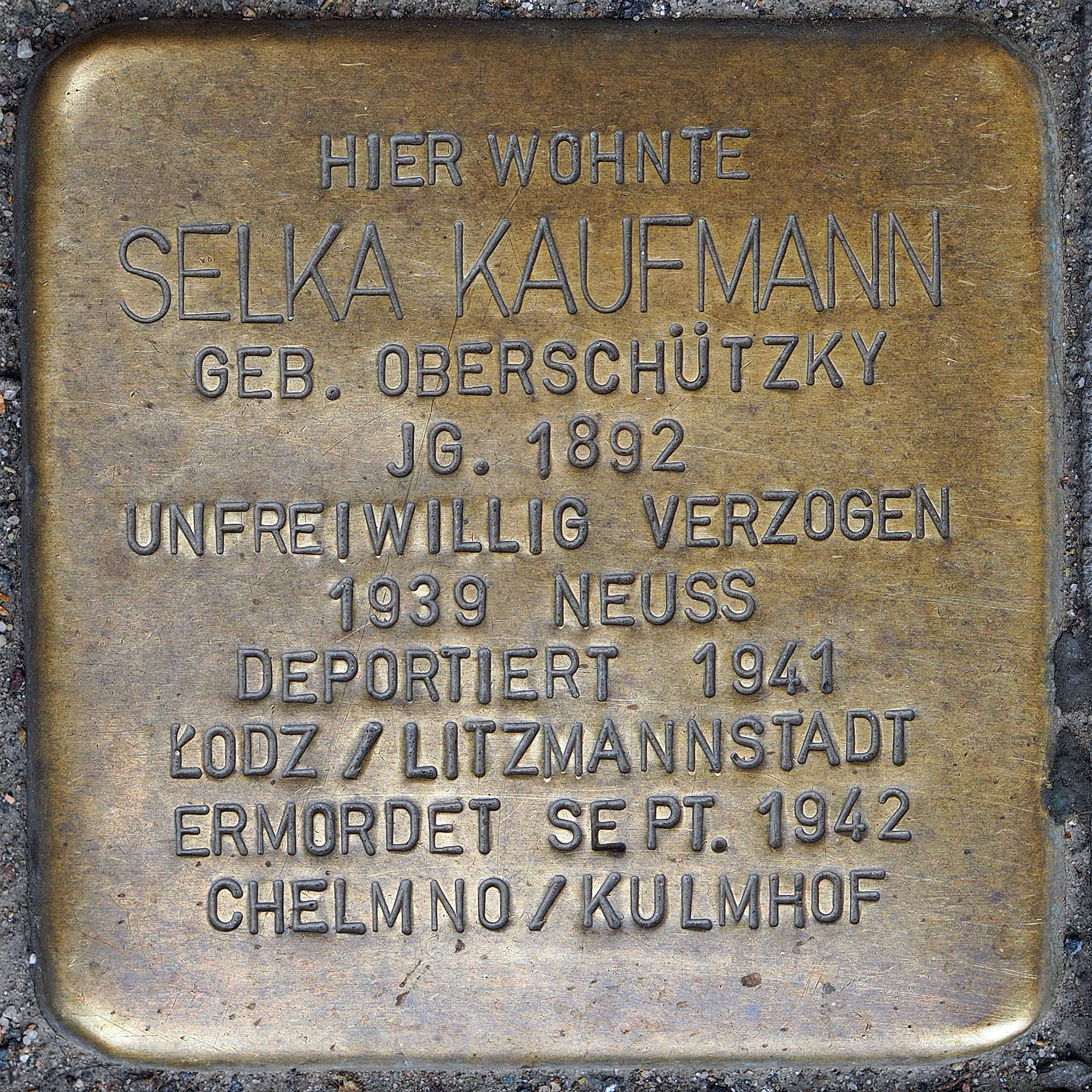 Stolpersteine GV: Kaufmann, Selka